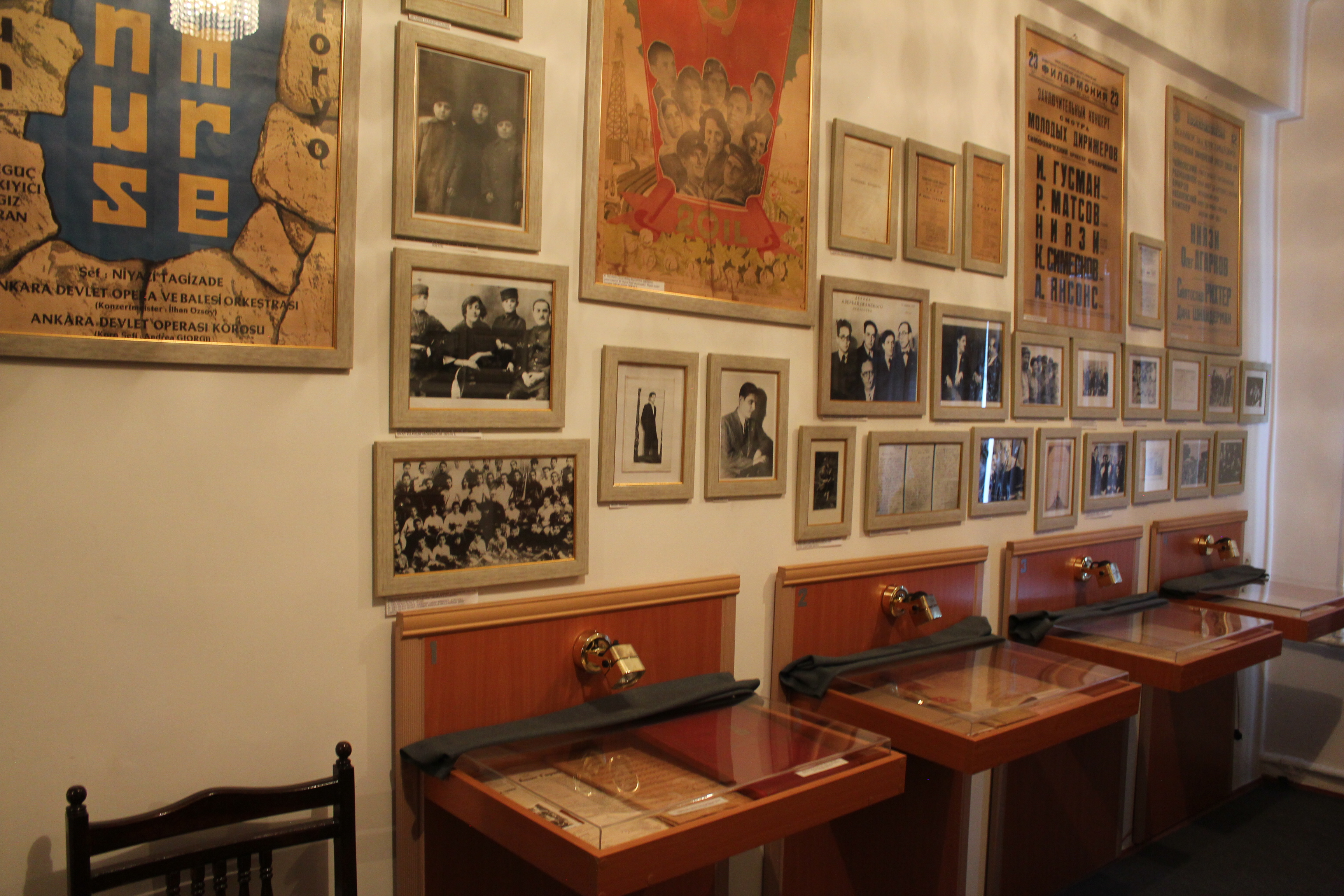 Интерьер экспозиционной комнаты в доме-музее азербайджанского дирижера и композитора Ниязи, где выставлены личные вещи Маэстро. В данной комнате отображается многостороннее творчество Ниязи.